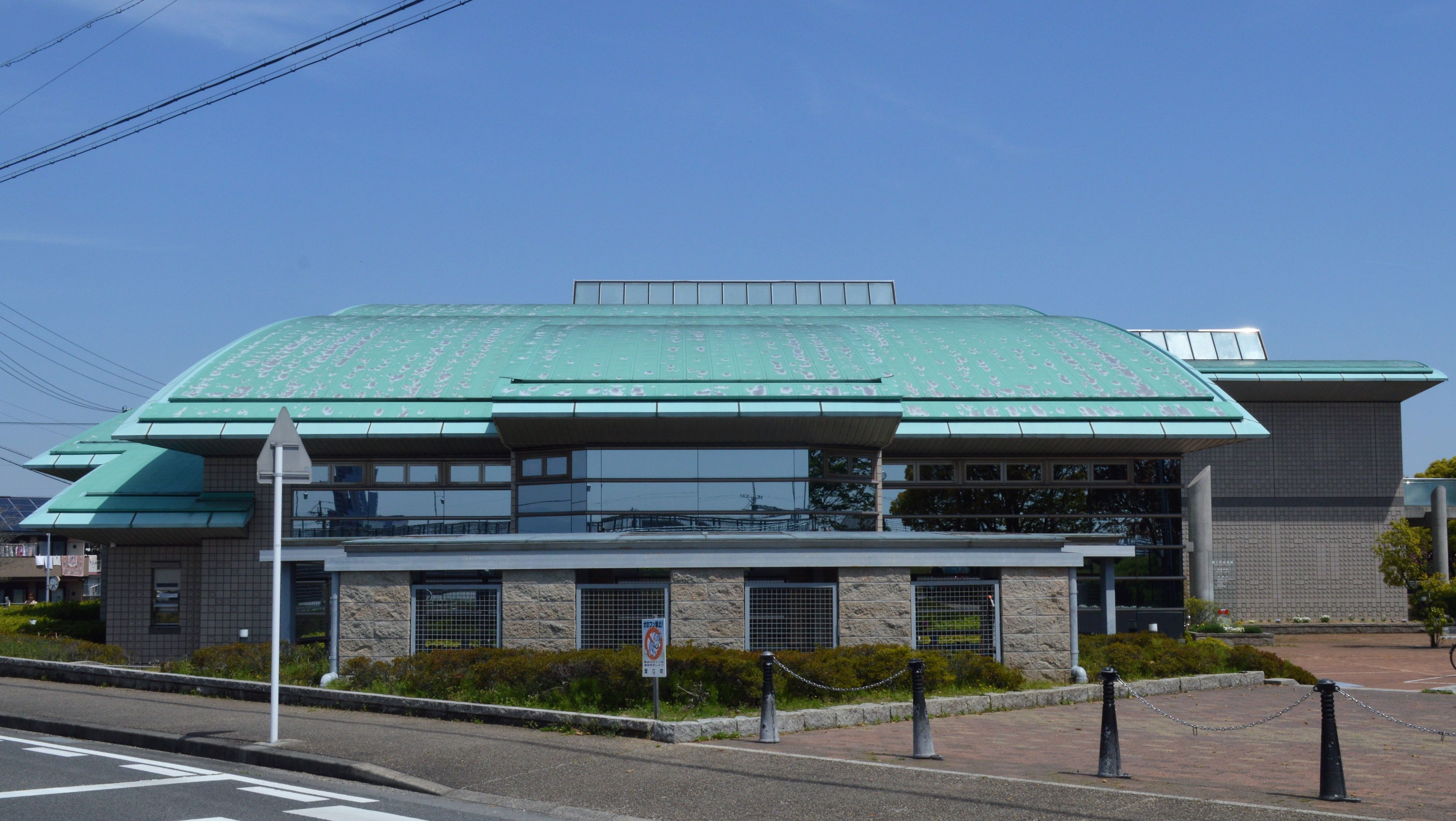 愛知県海部郡蟹江町にある蟹江町図書館。